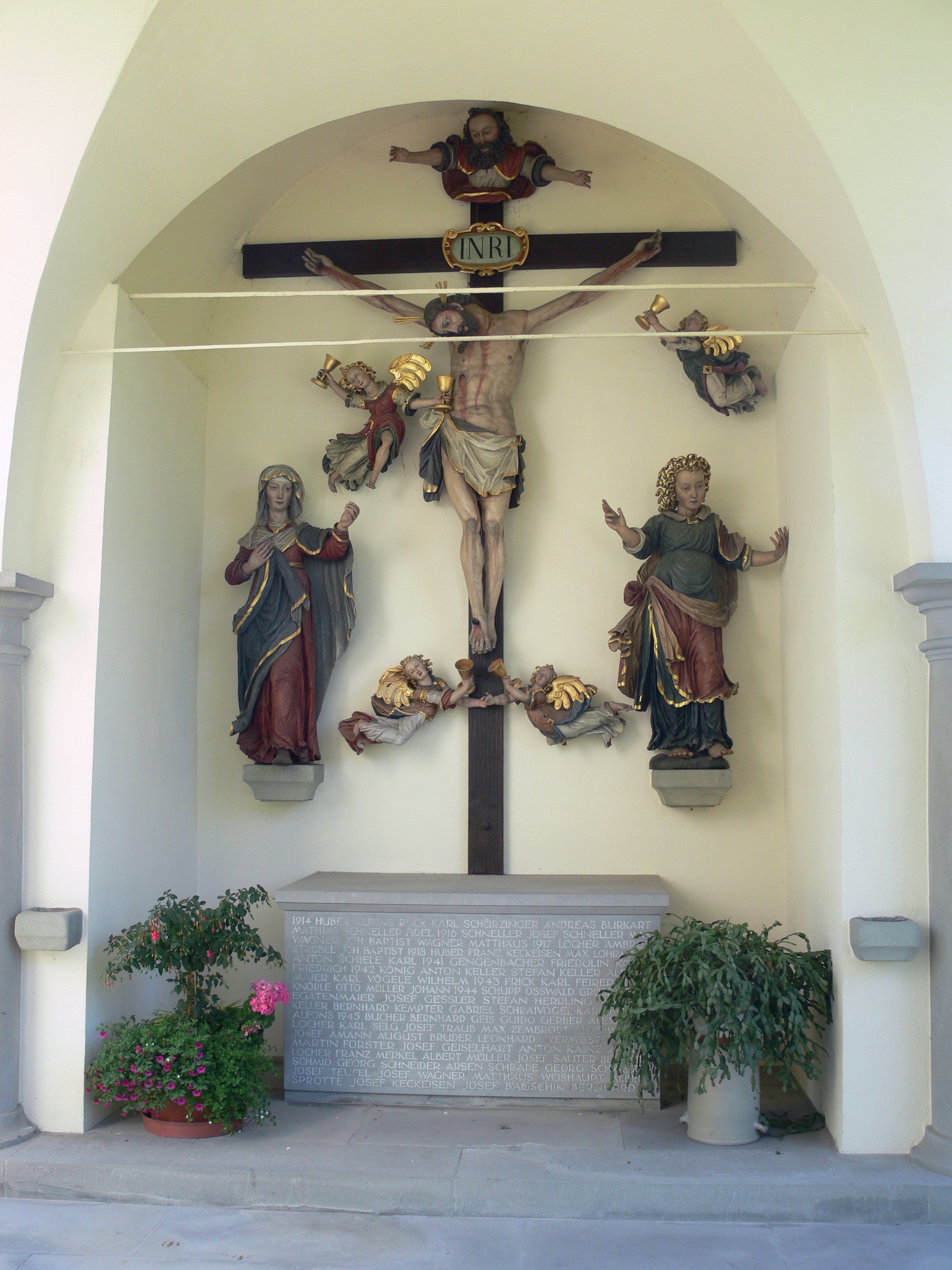 Brochenzell, Gemeinde Meckenbeuren, Bodenseekreis Heilig-Kreuz-Kapelle Kreuzigungsgruppe (ca. 1625–1650)